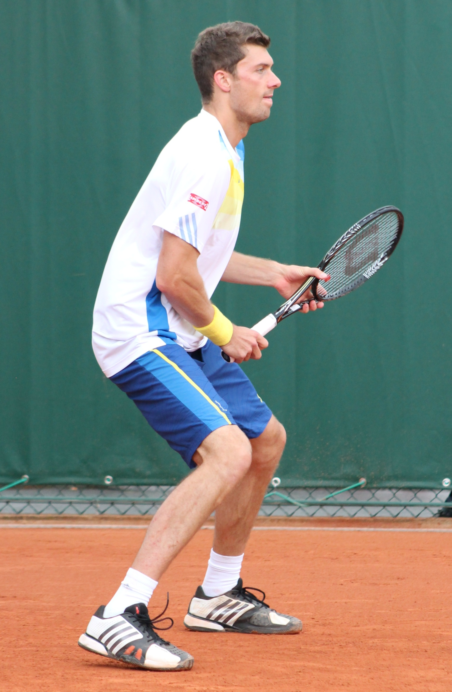 Daniel Brands